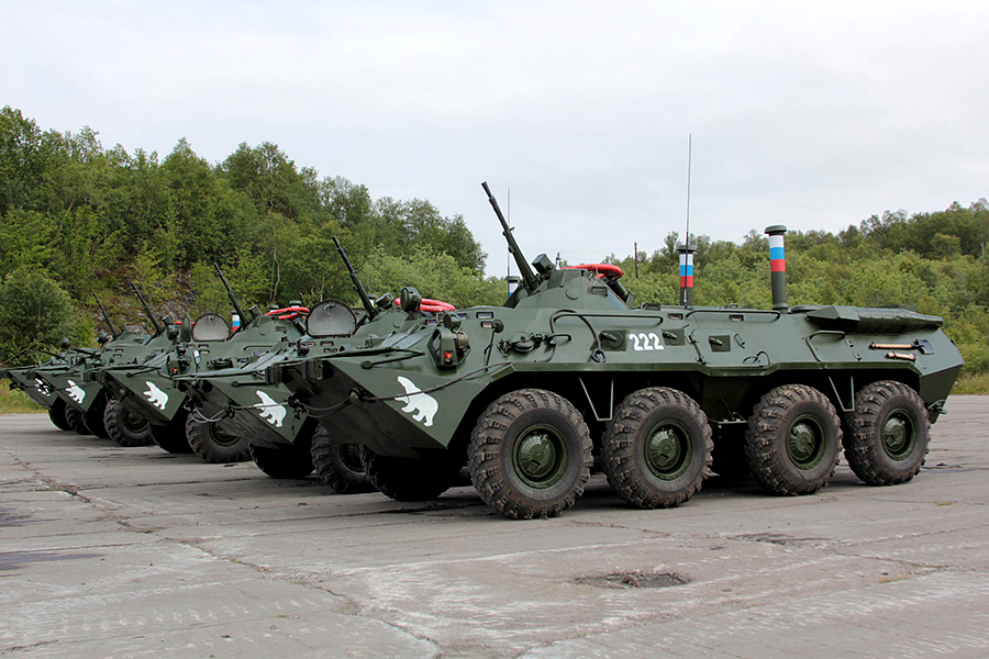 Морские пехотинцы Северного флота отработали высадку морского десанта с БДК на бронетранспортерах.